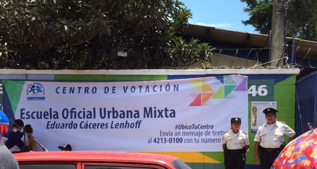 Elecciones generales de Guatemala de 2015